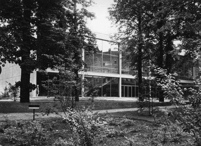 Berlin West Neubau der "Freien Volksbühne". Berlin-Wilmersdorf, Schaperstr.